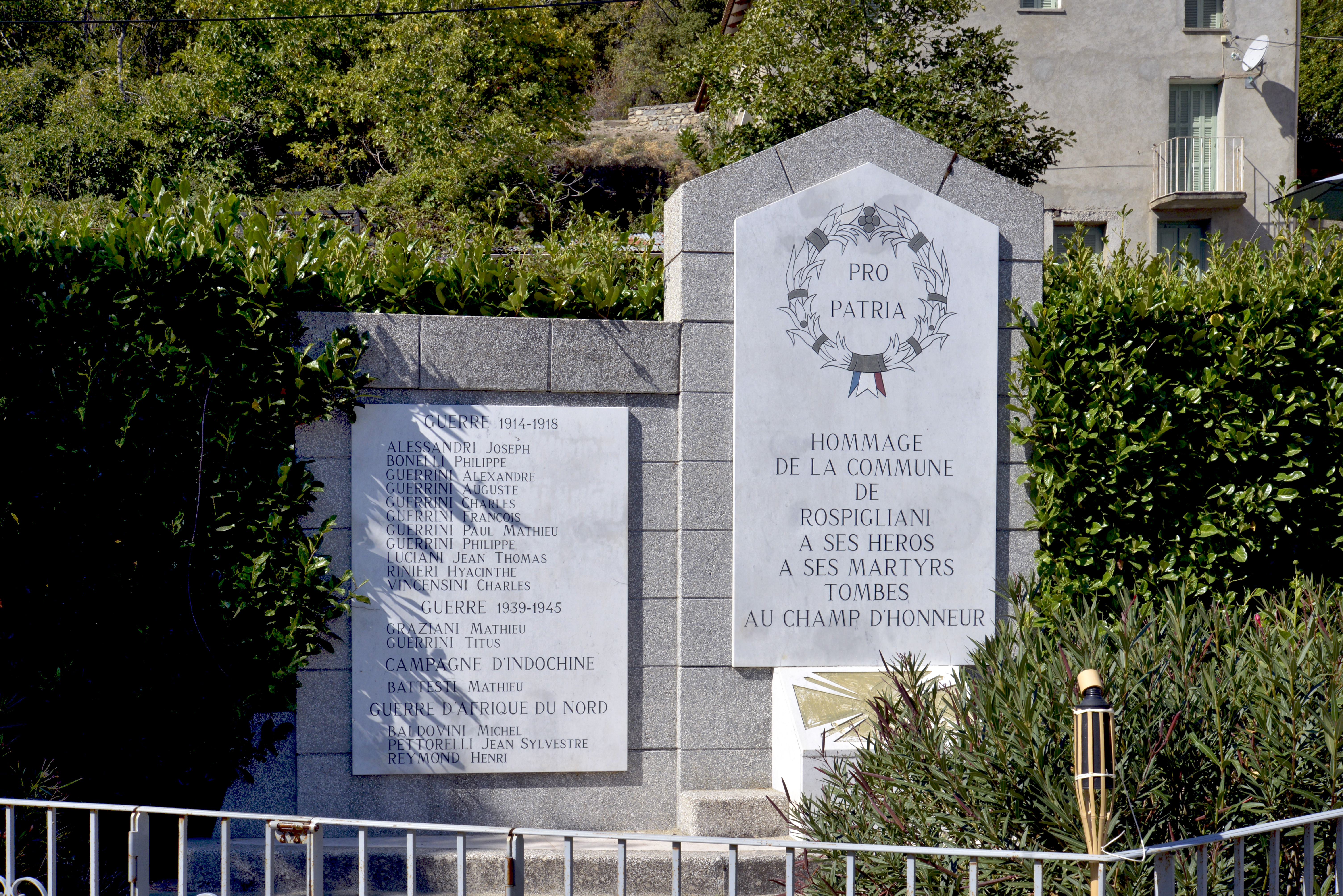 Rospigliani, Centre Corse (Haute-Corse) - Monument aux morts sur la place de l'église.